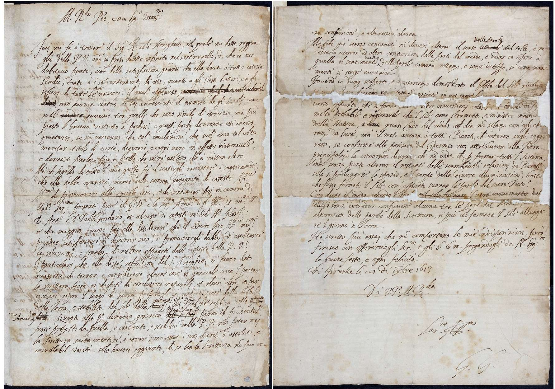 המכתב שבו גלילאו כתב לראשונה כי השמש לא סובבת את כדור הארץ